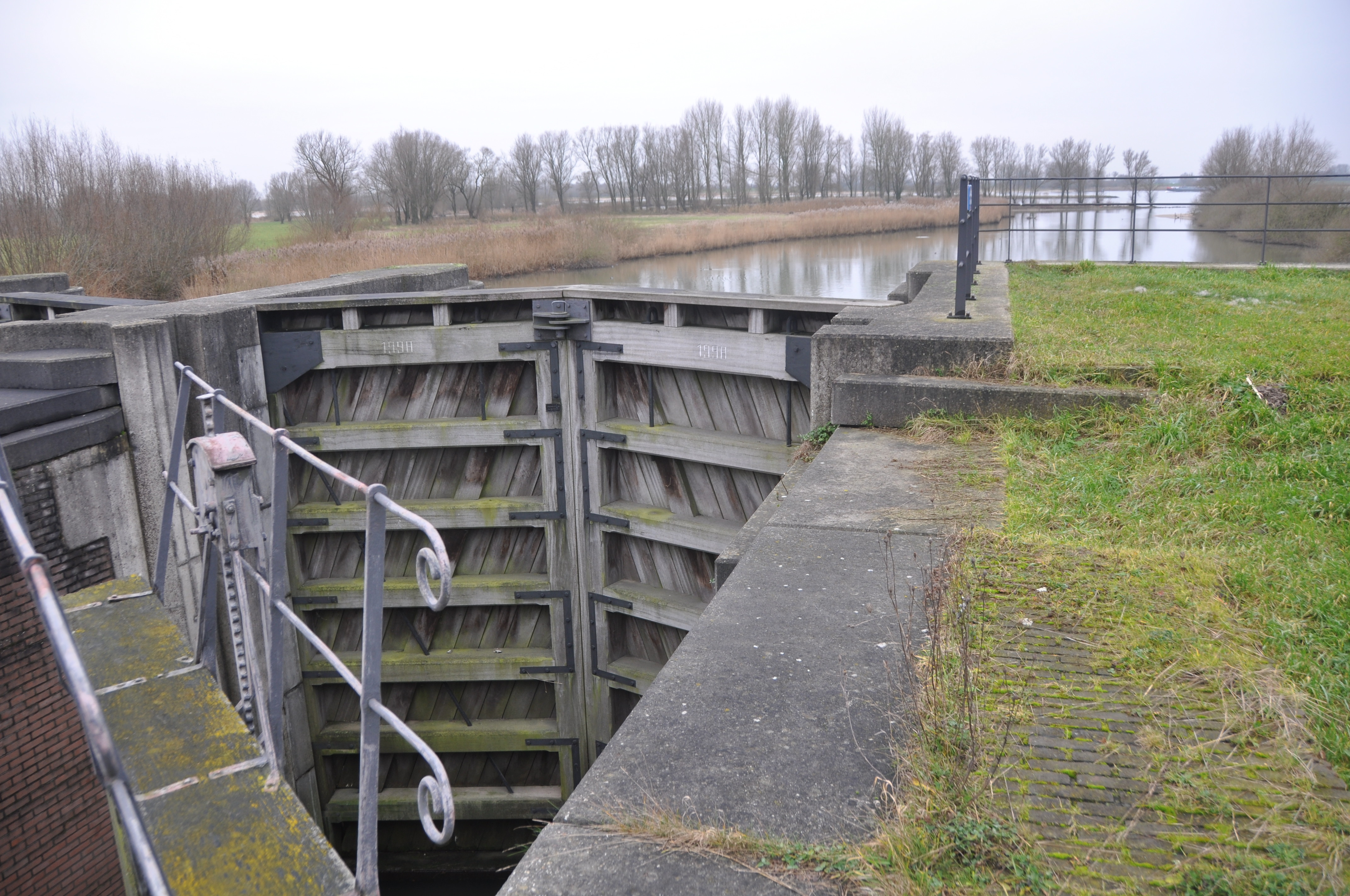 De Inundatiesluis in Dalem, bedoeld om de Tielerwaard leeg te laten lopen na overstroming.